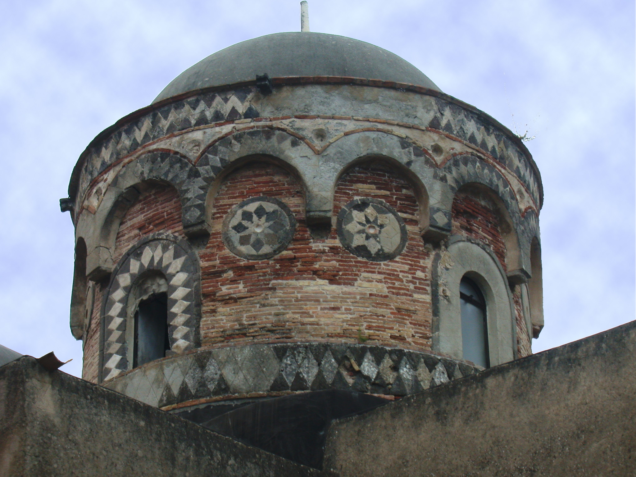 Gaeta (provincia di Latina, Lazio, Italia), cupola decorata della chiesa di San Giovanni a Mare.